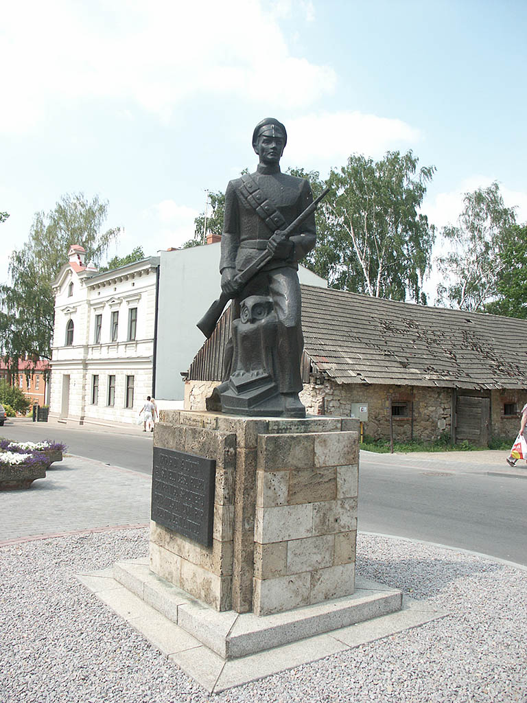 Латвия (Latvija): Цесис район (Cēsu rajons): Цесис (Cēsis): Центр (Centrs) (Bērzaines iela): памятник (Cēsu pulka Skolnieku rotas piemineklis); 14:08 08.07.2006